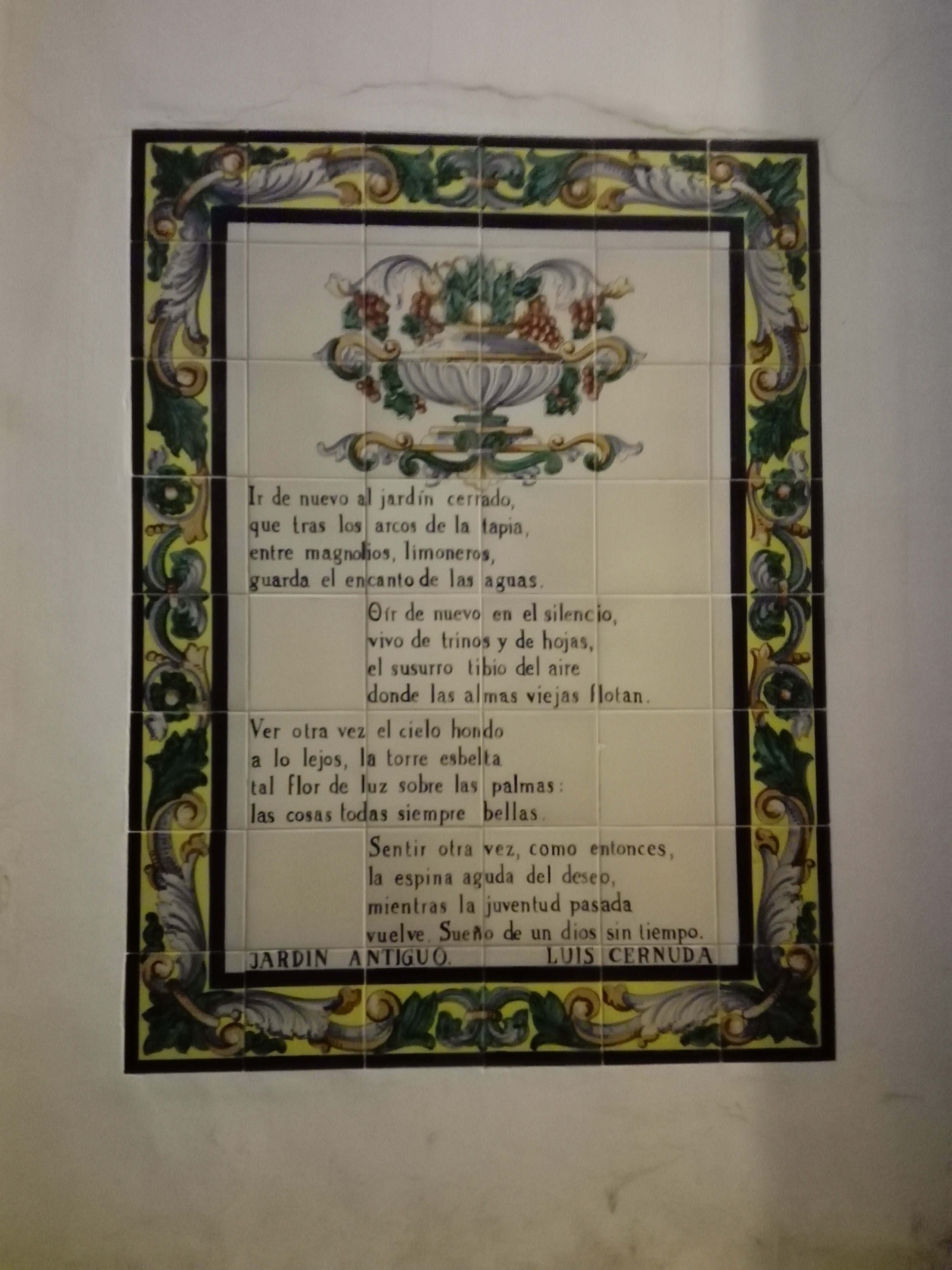 Fachada de la casa en la que vivió el poeta Luis Cernuda entre 1920 y 1928 en la calle Aire (Sevilla).